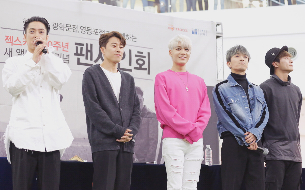 170504 젝스키스 팬사인회 은지원 이재진 김재덕 강성훈 장수원